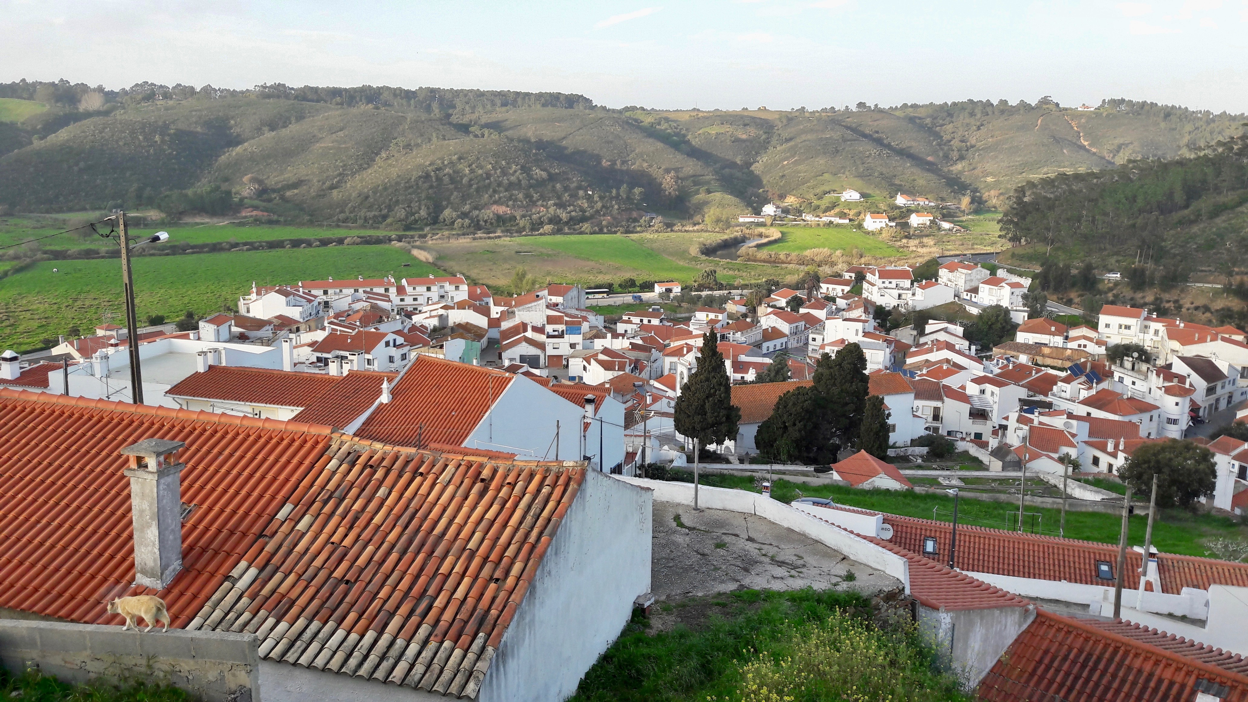 Vista de Odeceixe, Aljezur